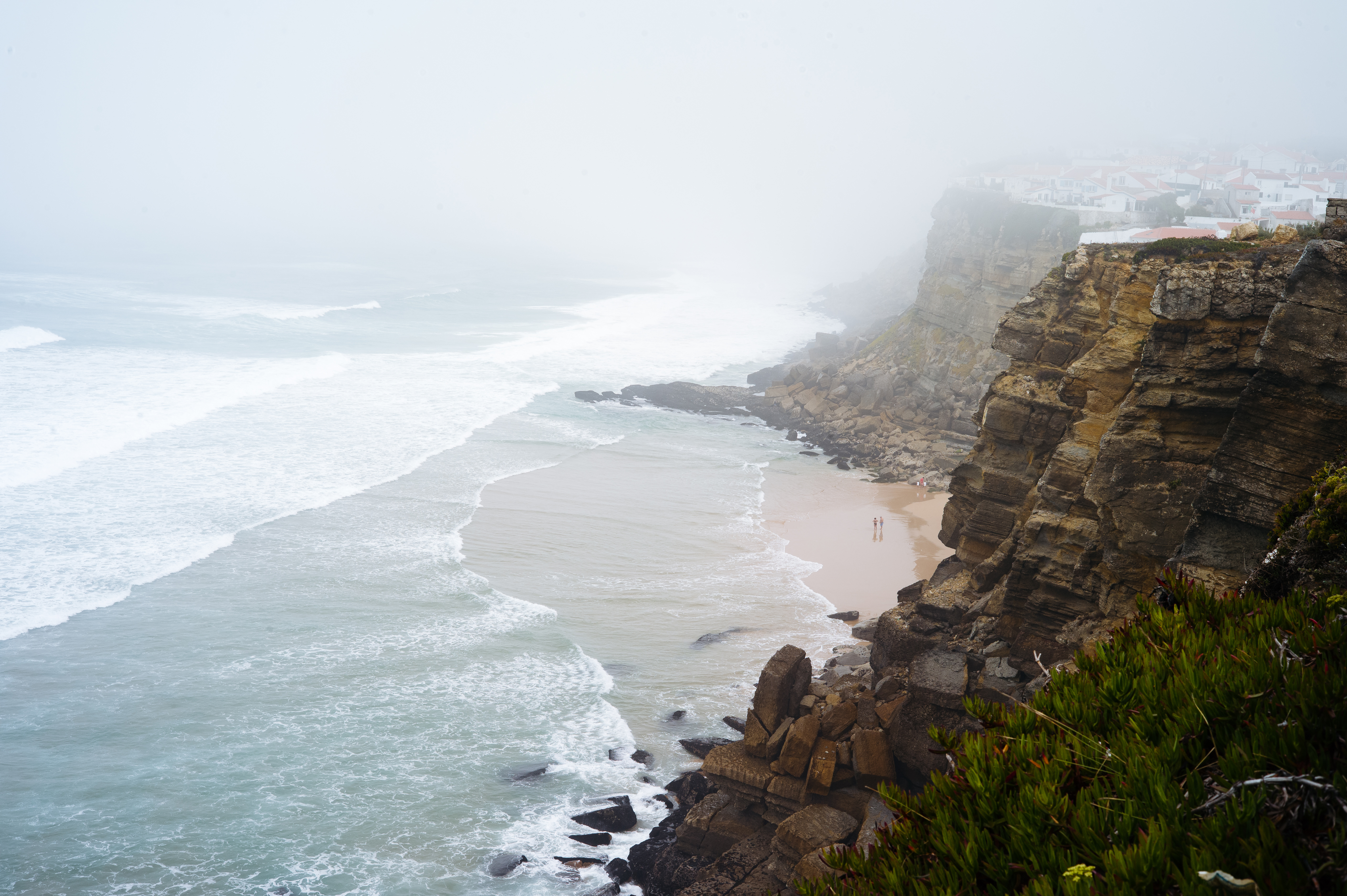 Azenhas do Mar, Colares, Portugal